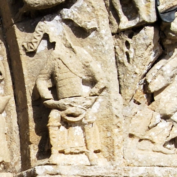 Détails du Zodiaque du Portail